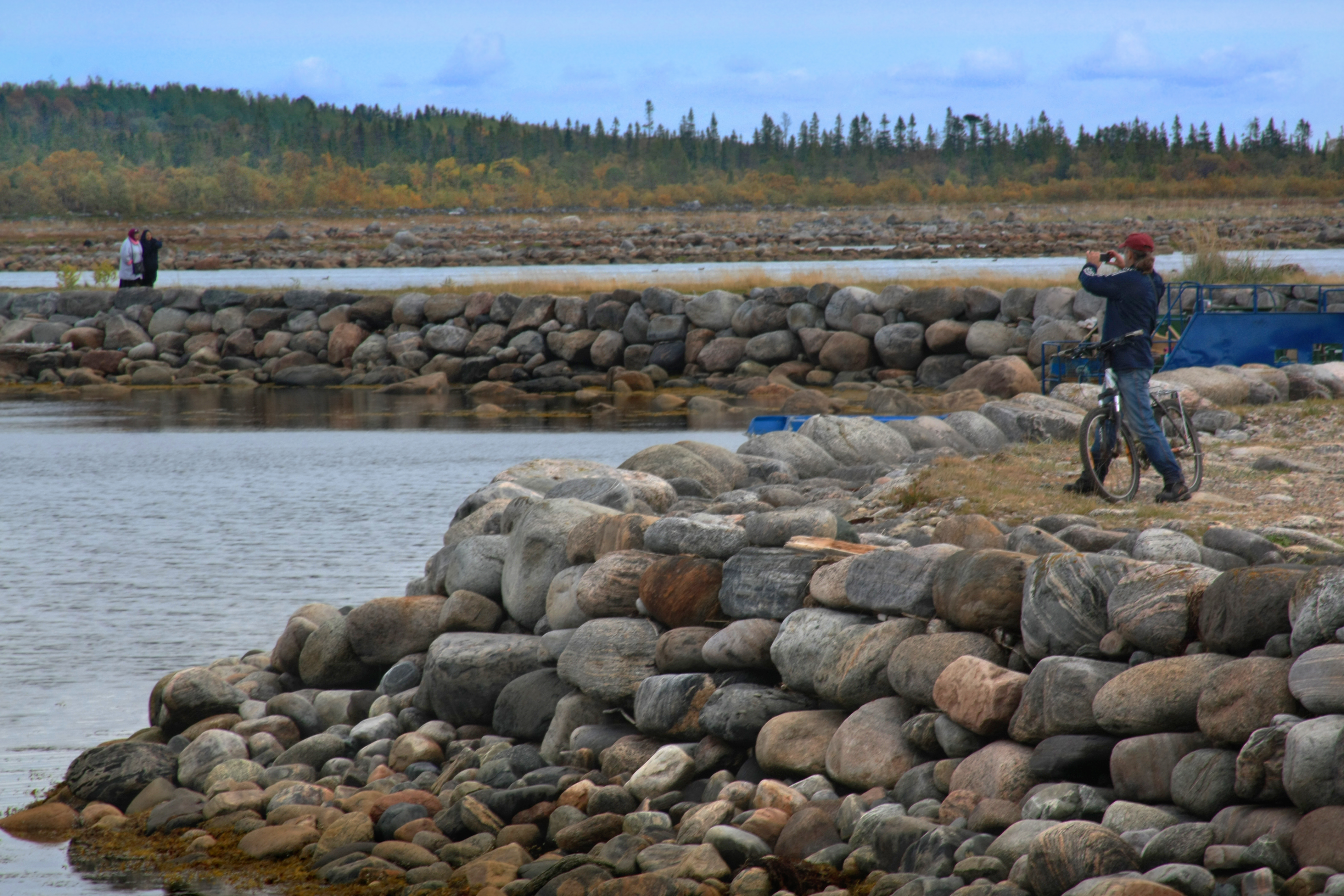 Kivine tamm ühendamas Solovetsi saart Muksalma saarega